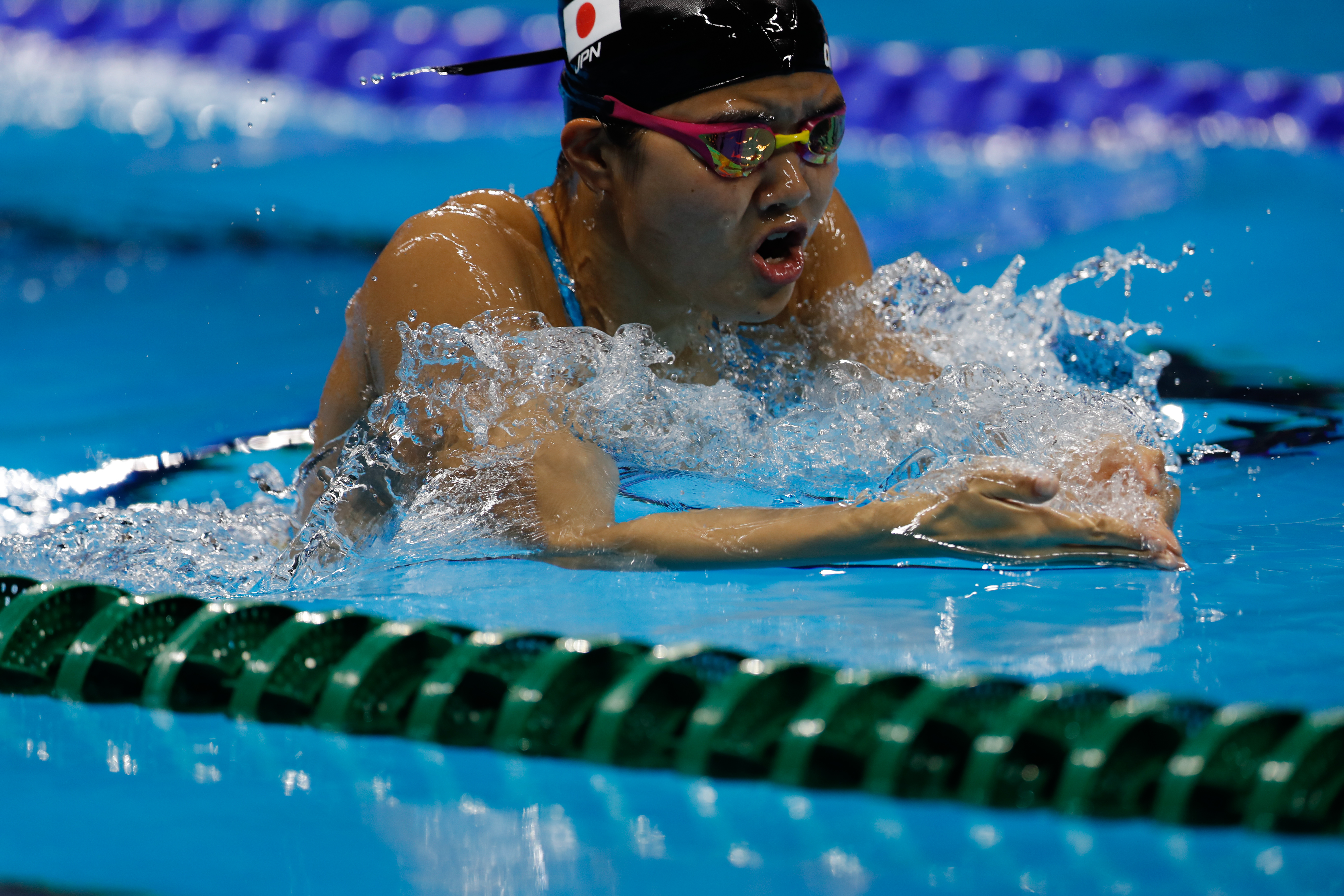 Rio de Janeiro - Atletas da equipe natação do Japão treinam na piscina do Estádio Aquático, no Parque Olímpico da Barra da Tijuca (Fernando Frazão/Agência Brasil)